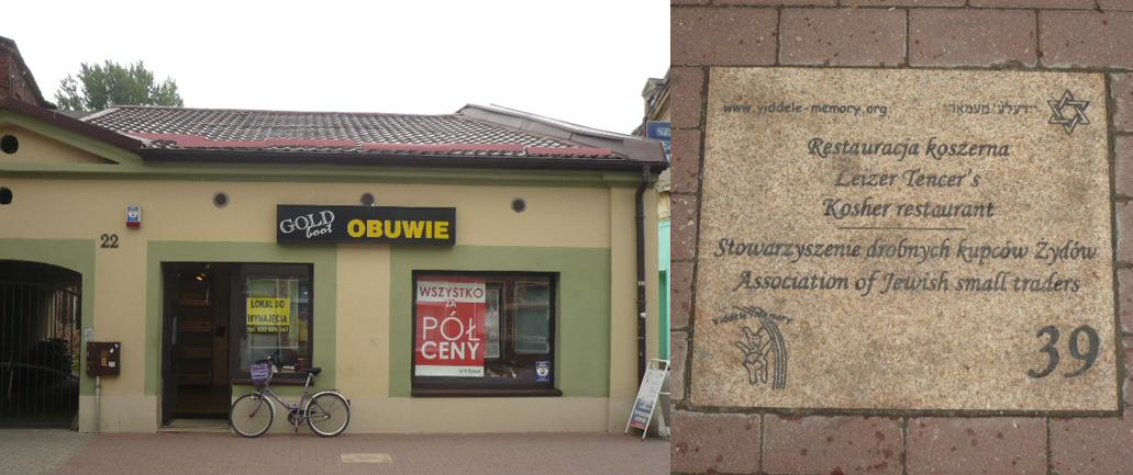 Radomsko. Otwarte Muzeum Żydowskie 39